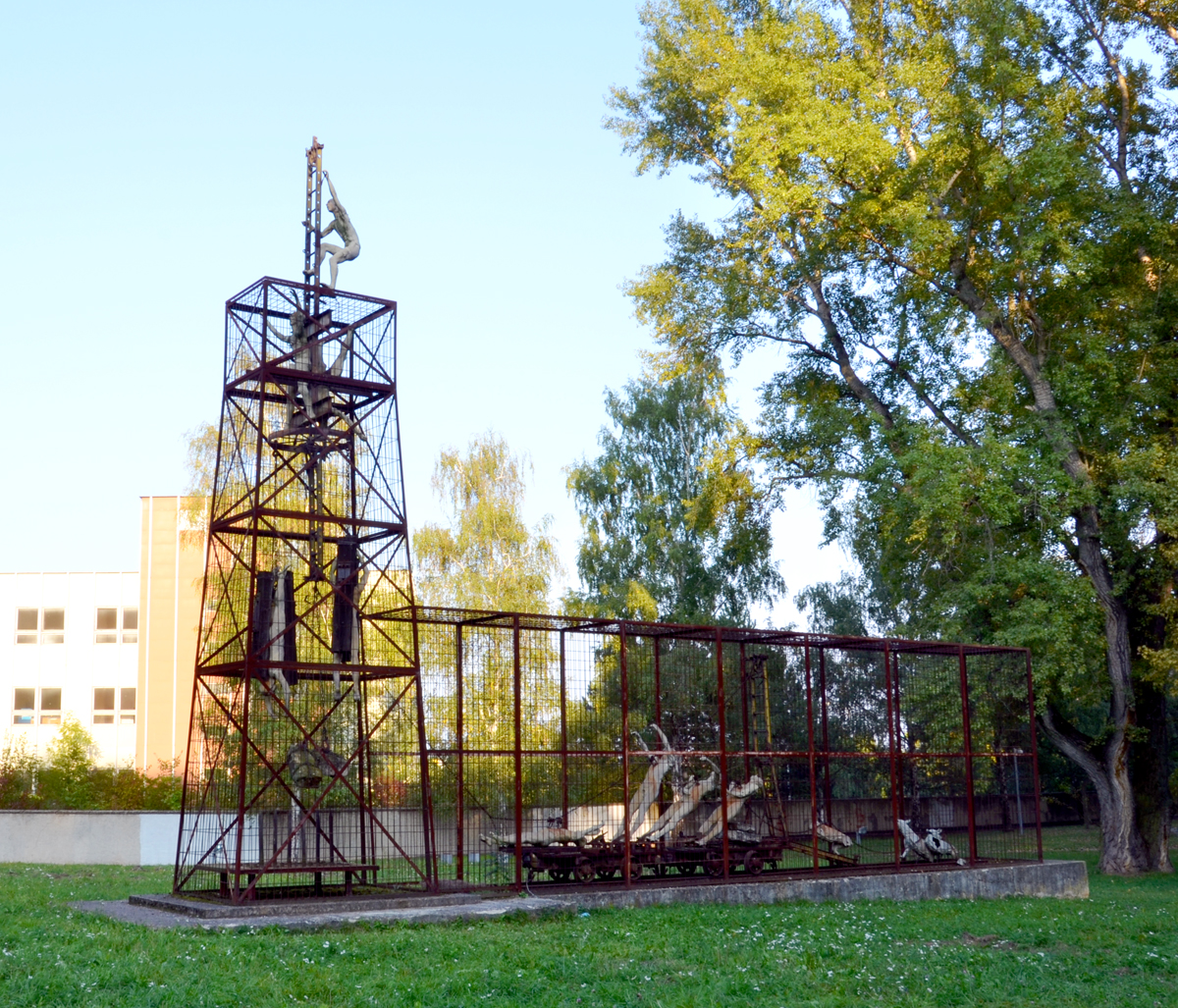 Jiří Sozanský, Memento mori, 1992, Litoměřické krematorium